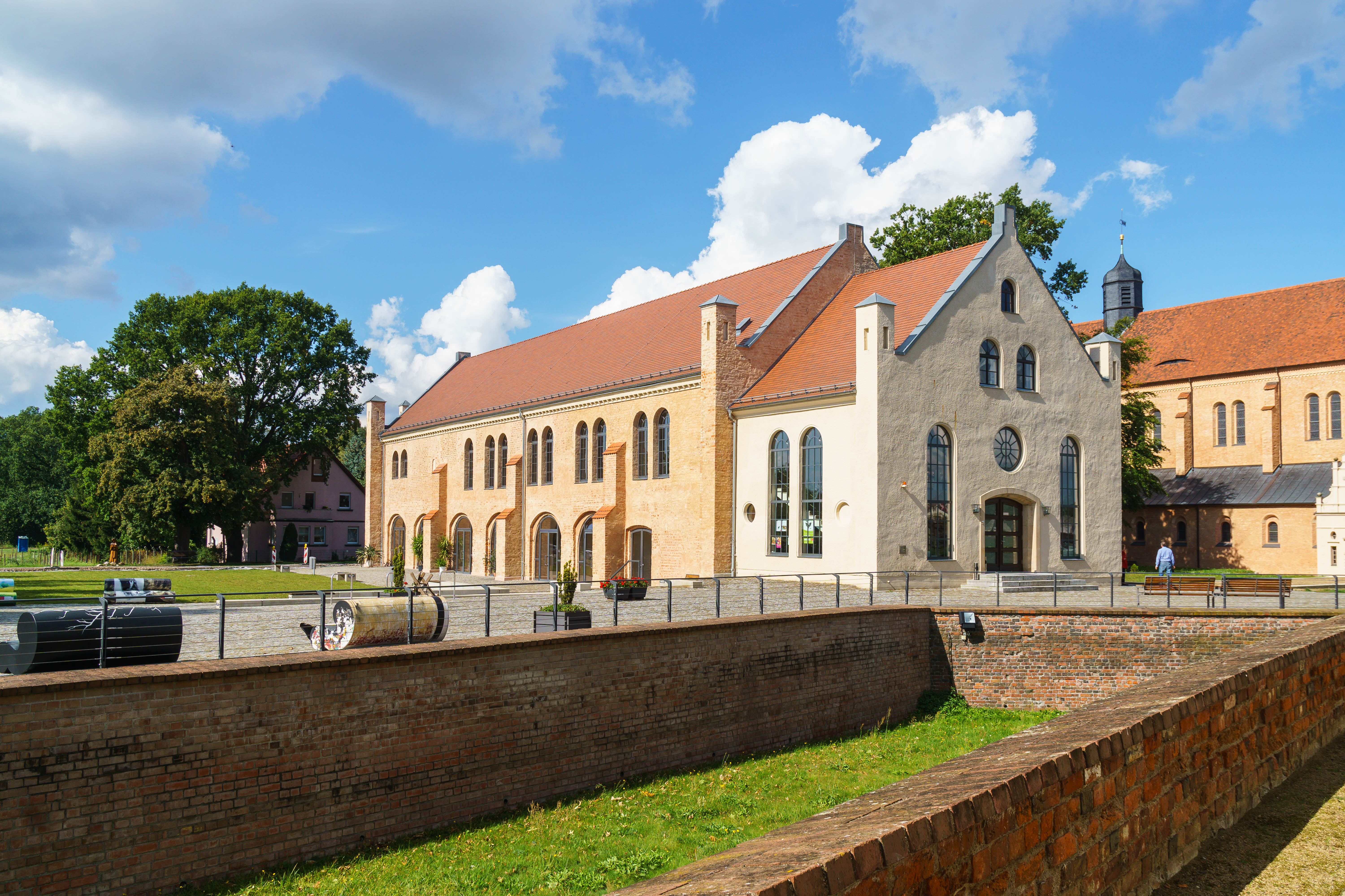 Refektorium des Klosters Doberlug, Schlossplatz in Doberlug-Kirchhain